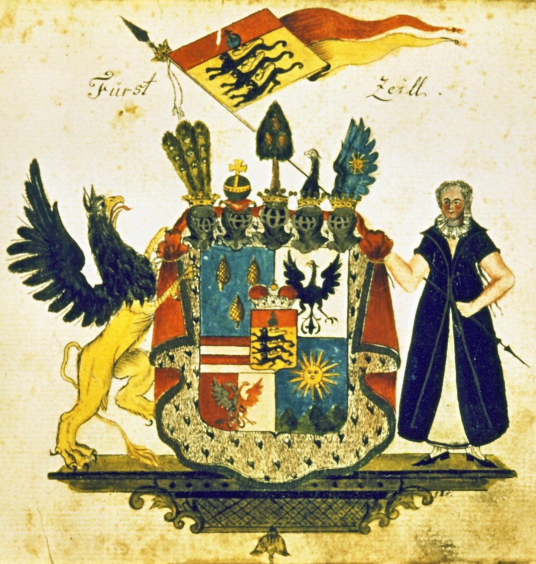 Wappen Waldburg-Zeil mit Sonnenberg, um 1805